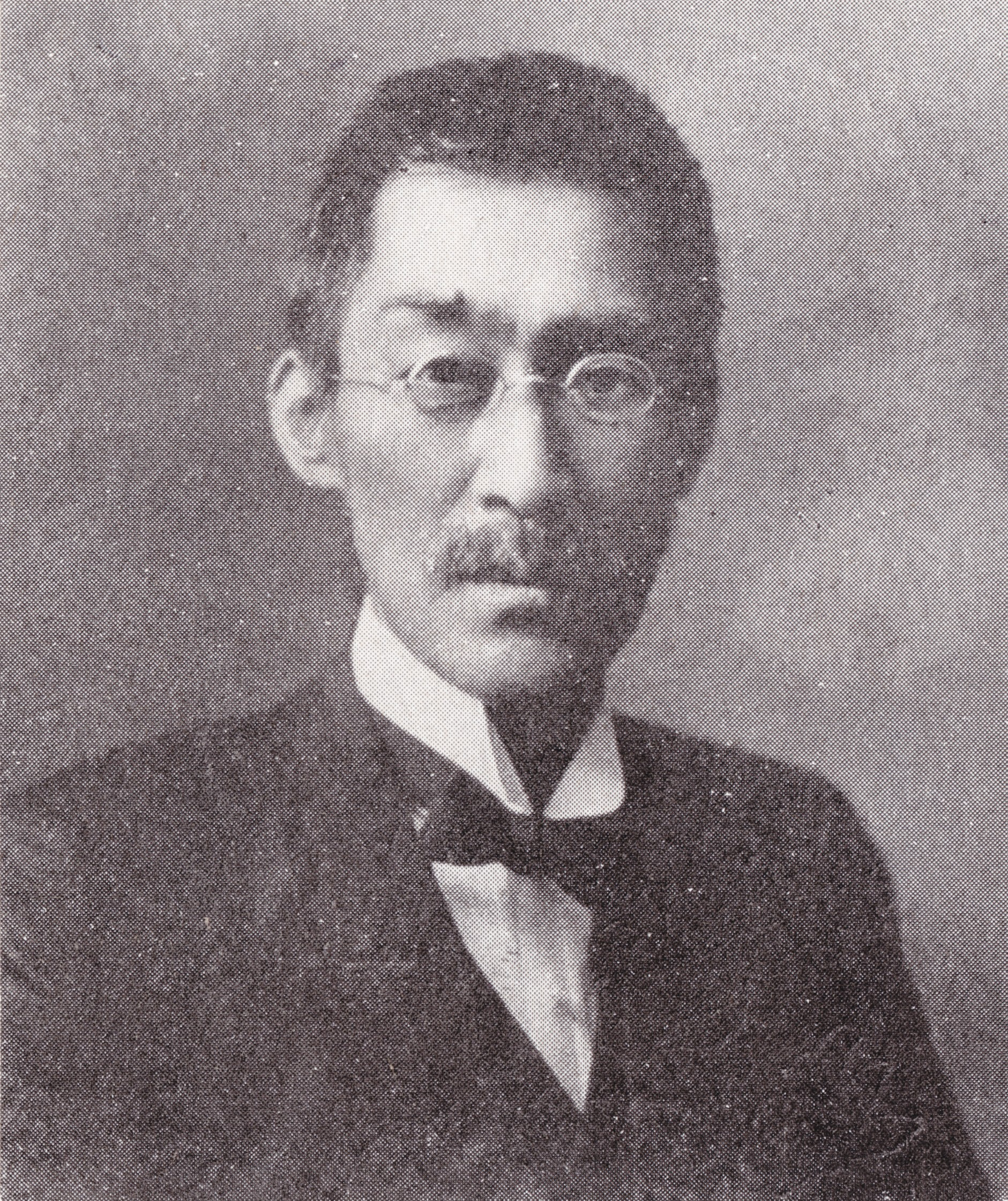 男爵壬生桄夫